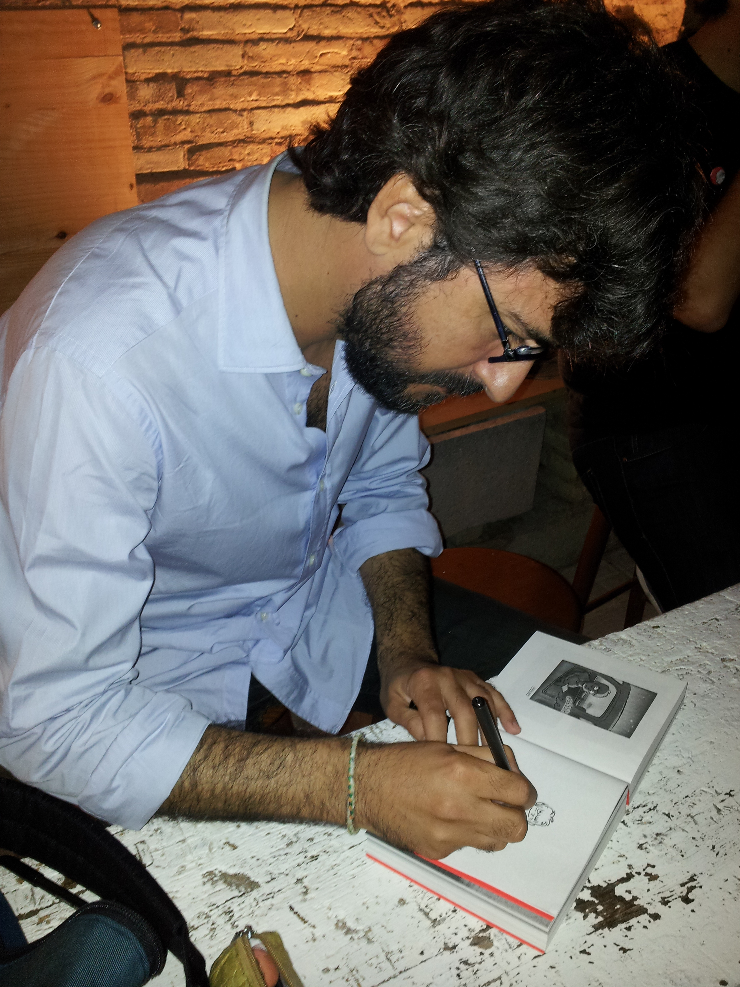 Juaco Vizuete a Russafa